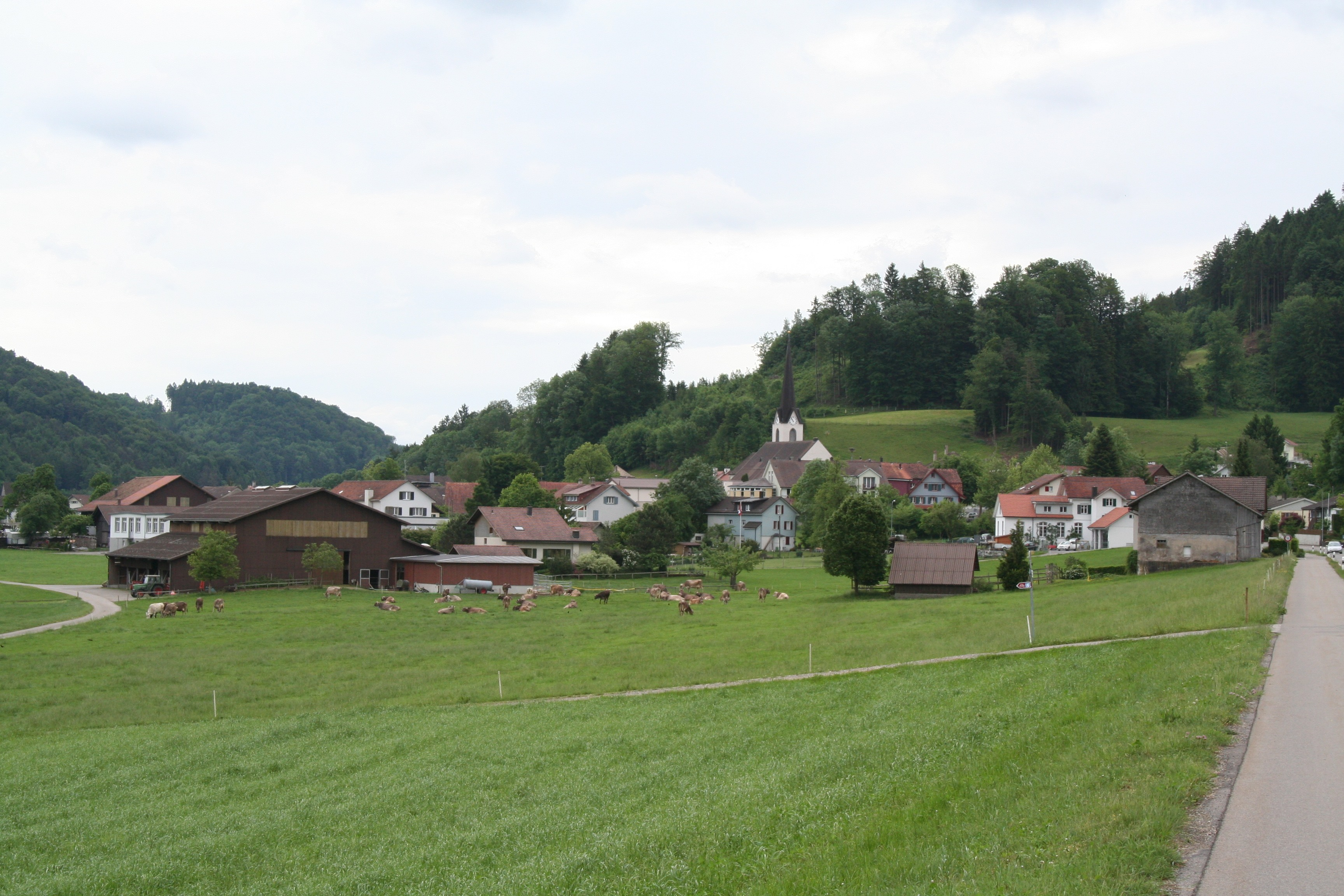 Burghügel der Burg Bichelsee